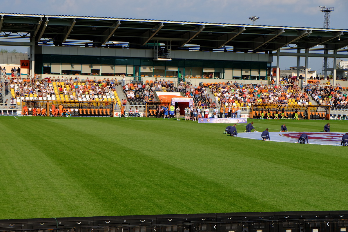 Трибуна А стадиона СКБ-Банк Арена во время матча Урал - ЦСКА, 13 августа 2016